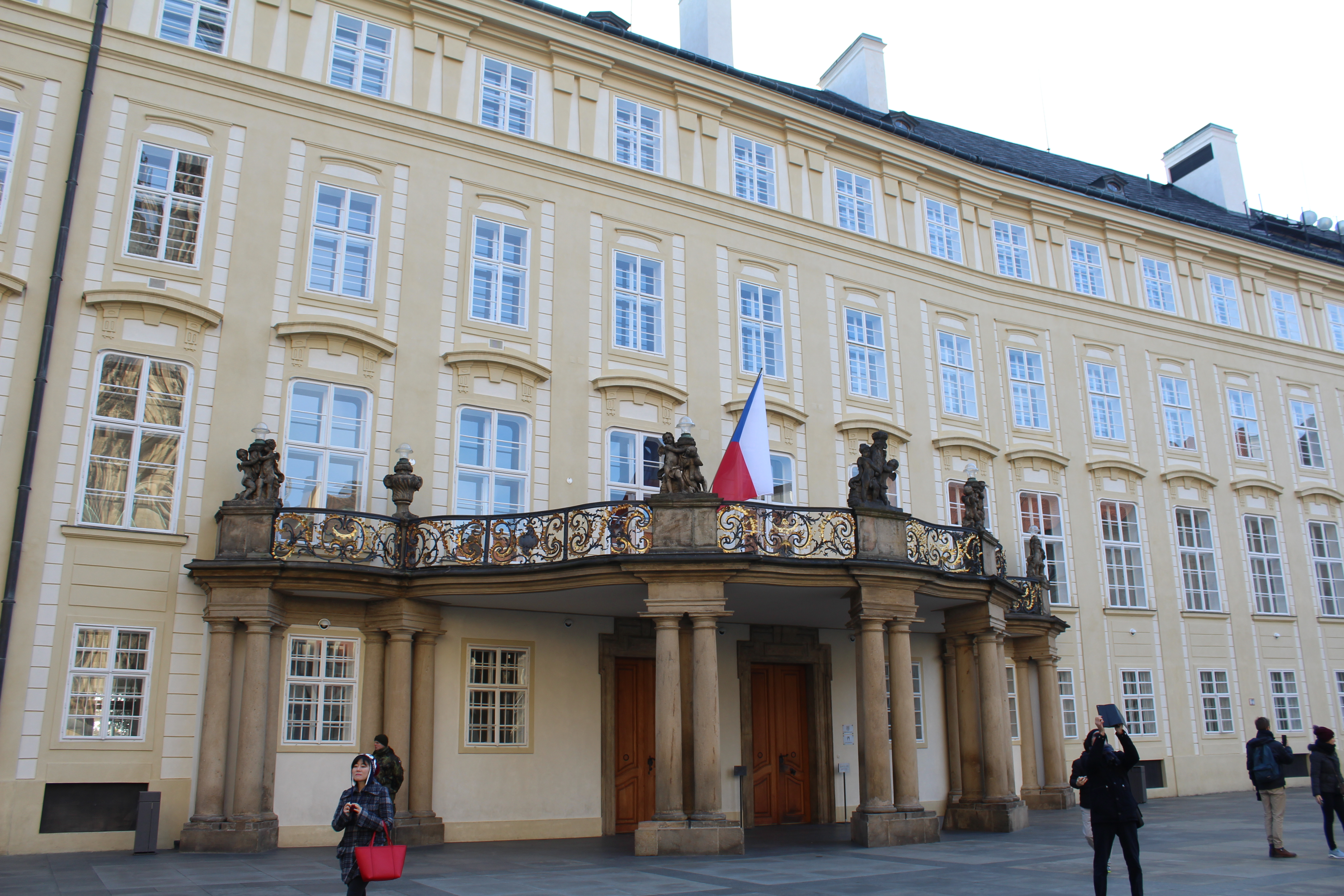 Château de Prague.